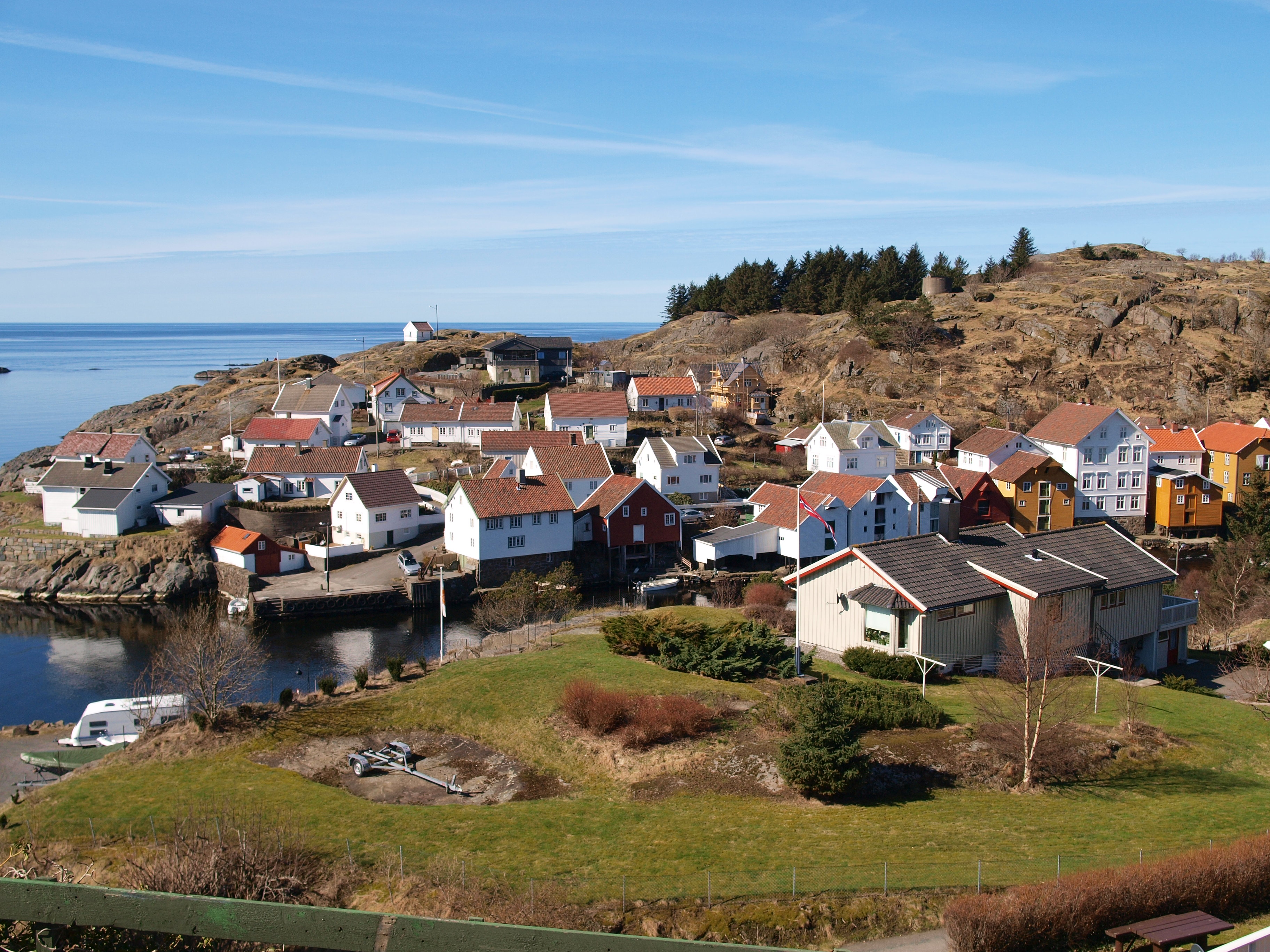 Den ytterste delen av Sogndalstrand. Ytterst ligger den gamle kommunale bryggen og moloen fra 1939.